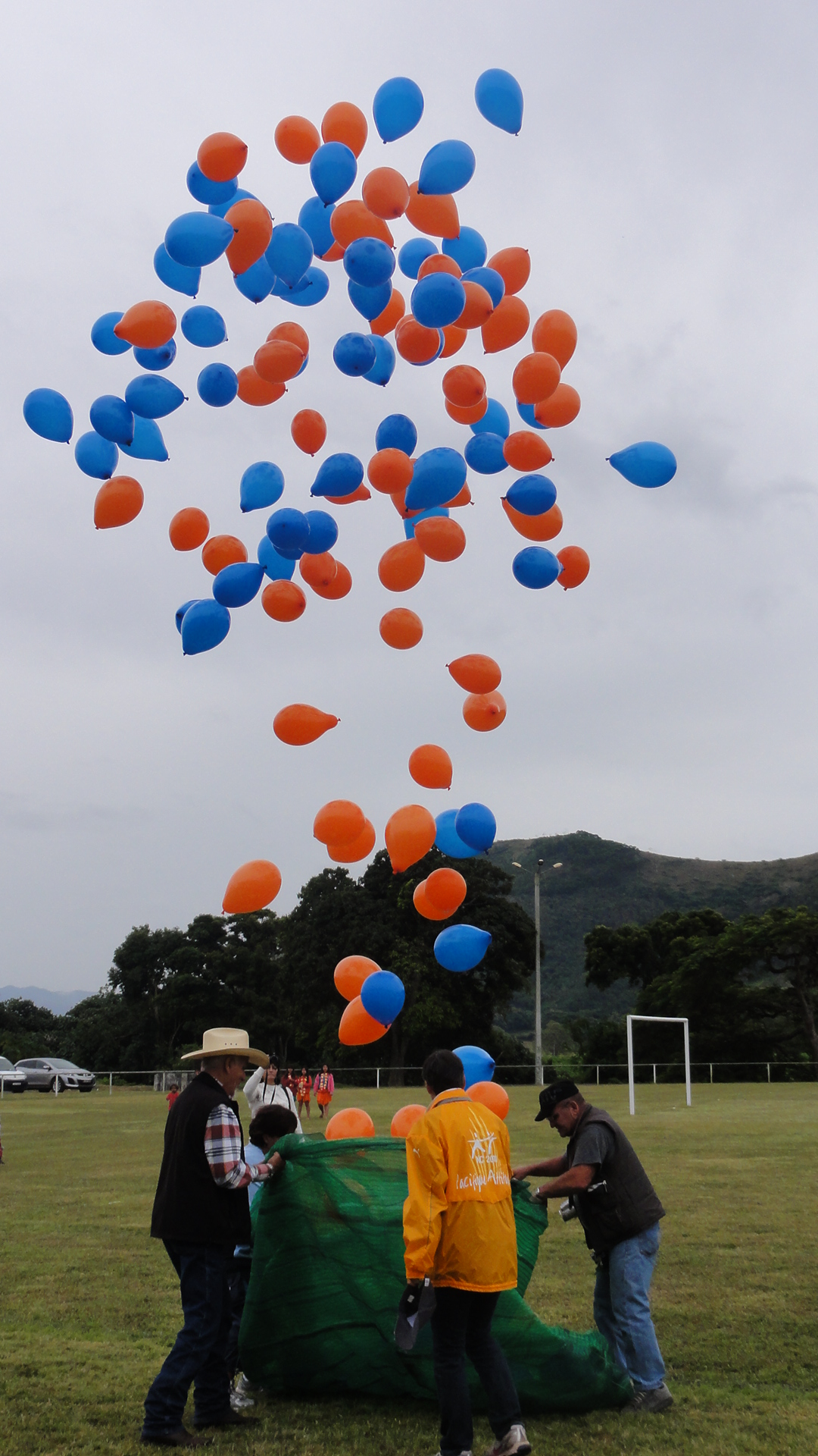 Laché de ballons